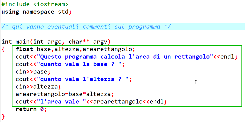 scriviamo il programma